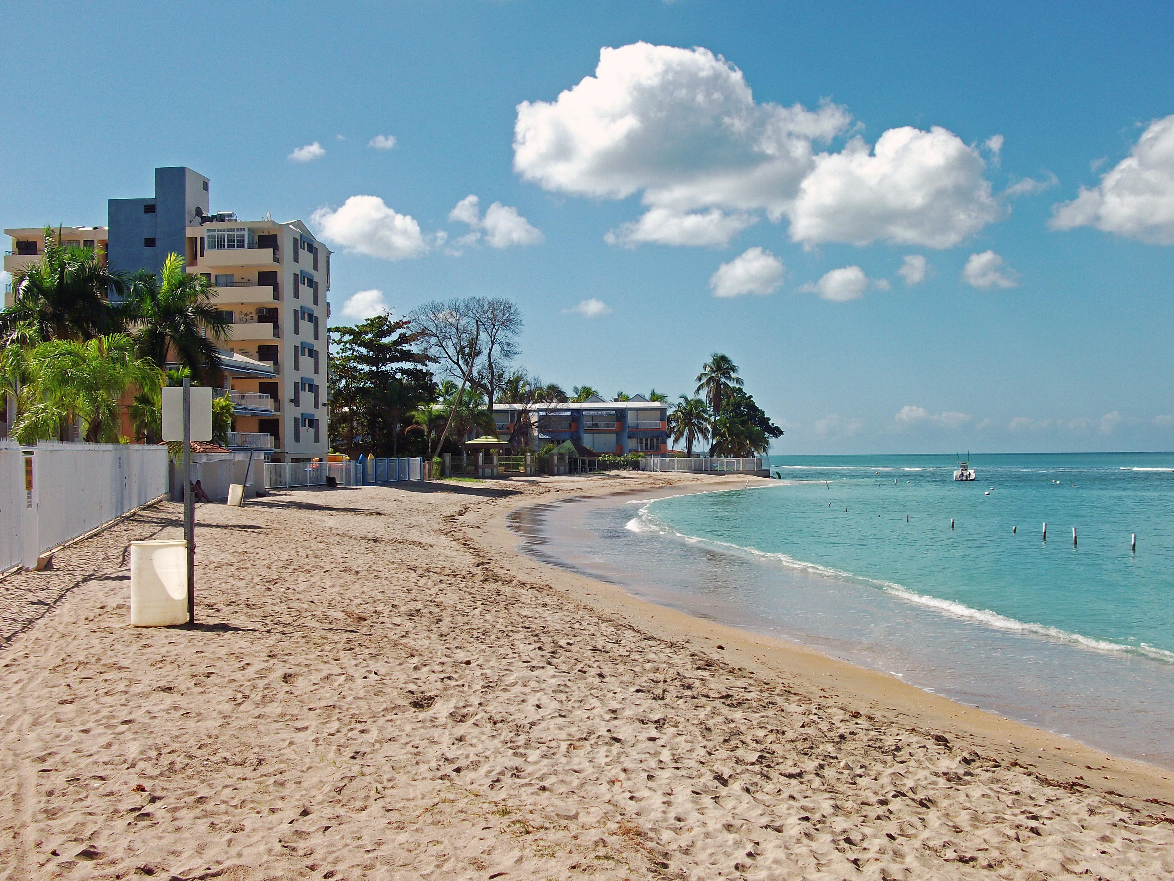 Playa Los Tubos - Zona Norte